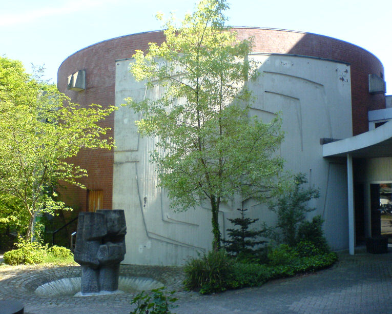 katholische Kirche St. Vinzenz, Hamburg-Harburg-Eißendorf